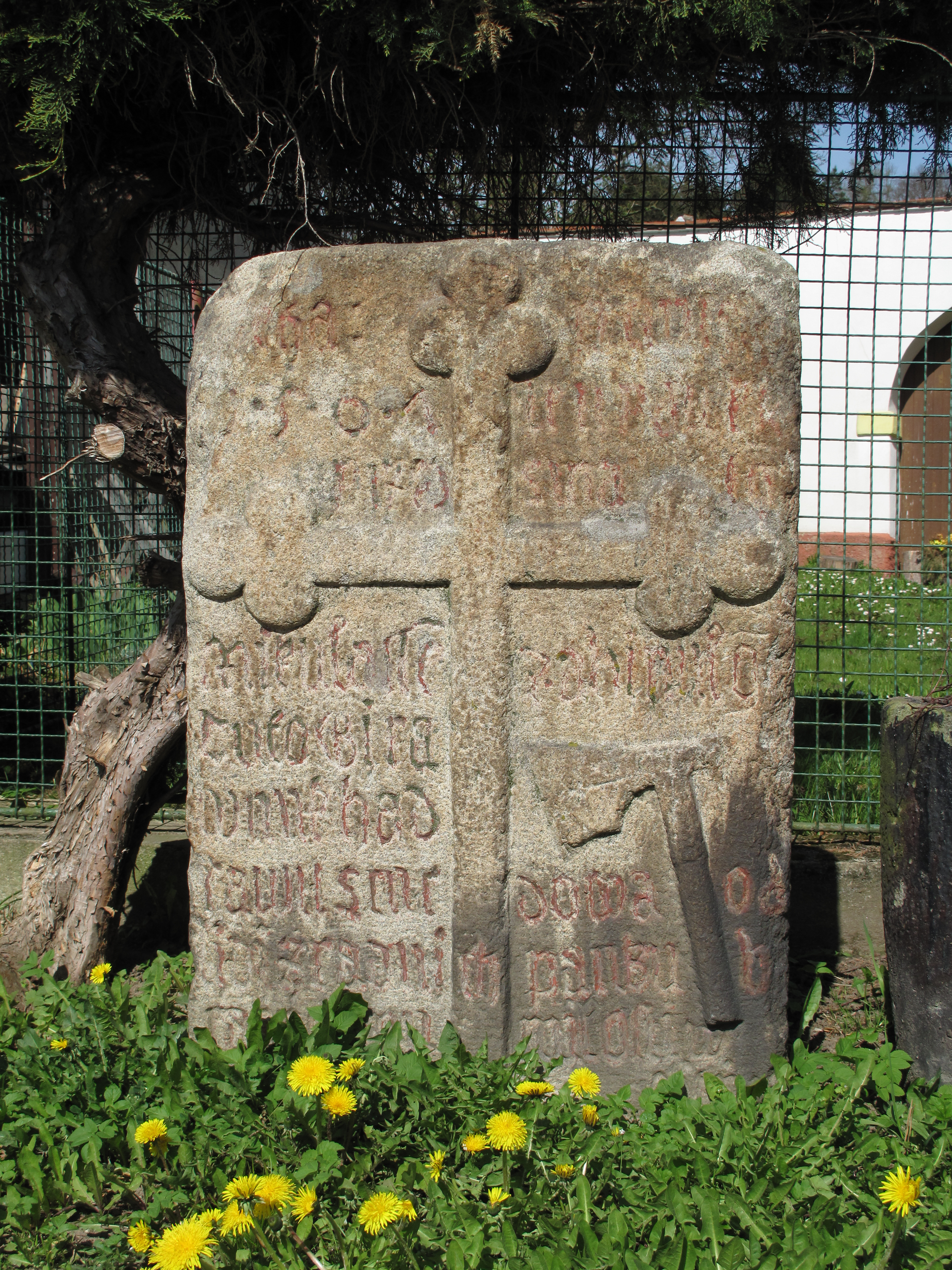 Smírčí kříž v Kletečné. Okres Pelhřimov, Česká republika.